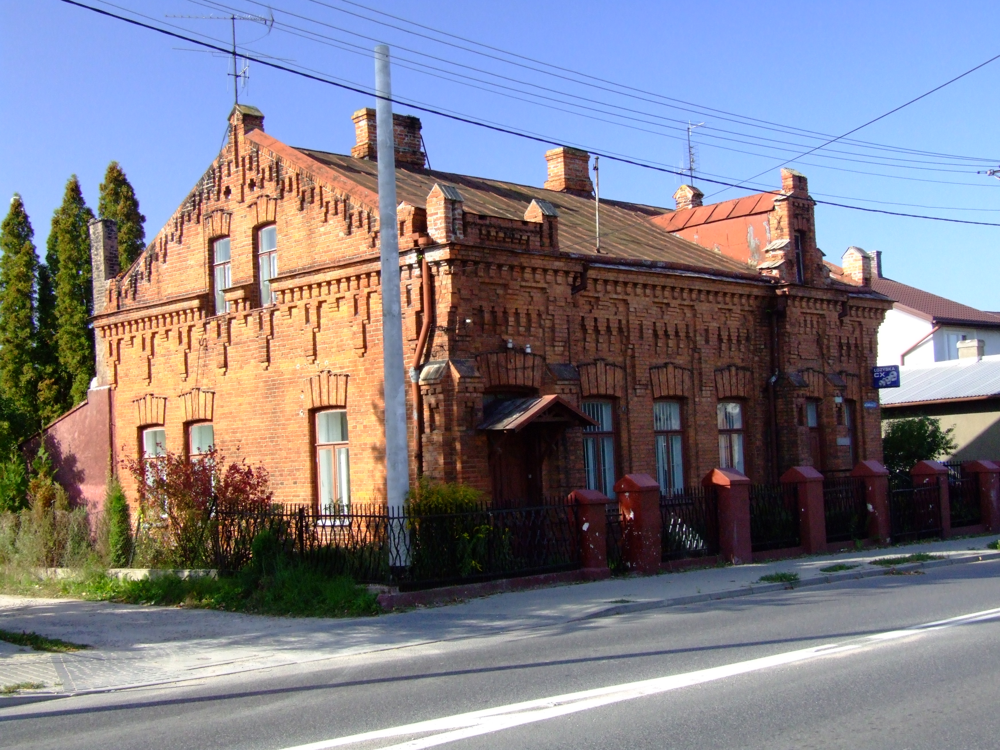 Ostrów Mazowiecka - widok od ulicy Dubois